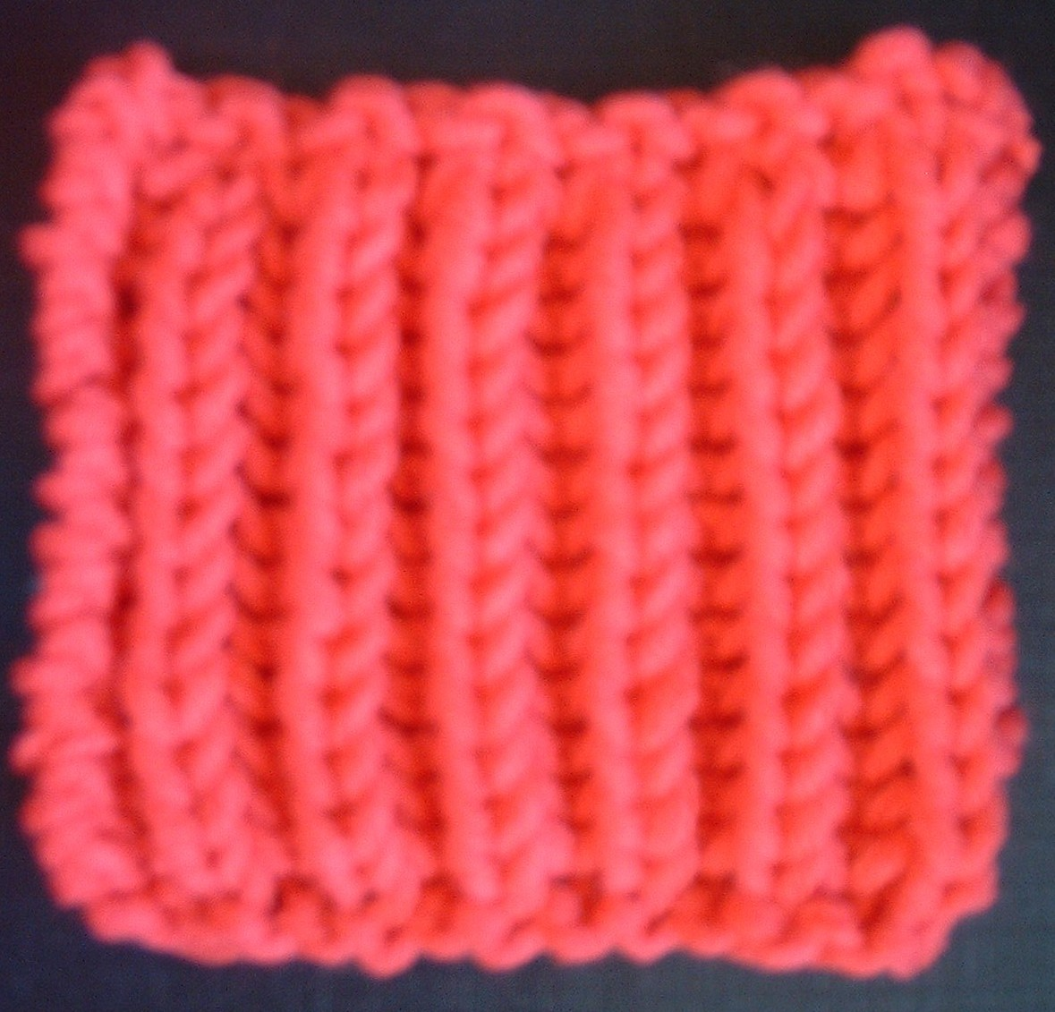 Handarbeit: Patentmuster